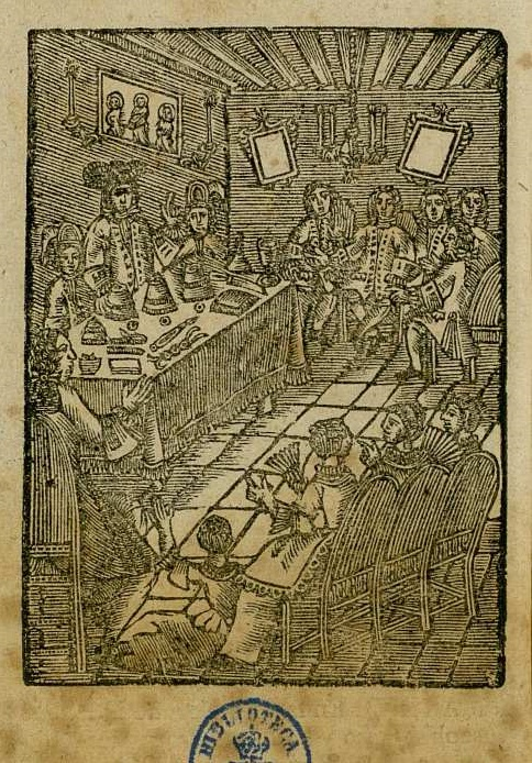 Pablo Minguet e Yrol, anteportada de "Engaños á ojos vistas", Madrid [1733], Biblioteca Nacional de España, signatura R/9152